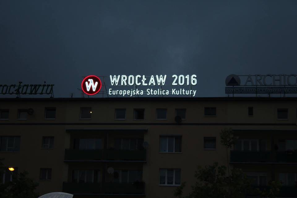 Logo EHMK 2016 na budove v meste Vroclav.